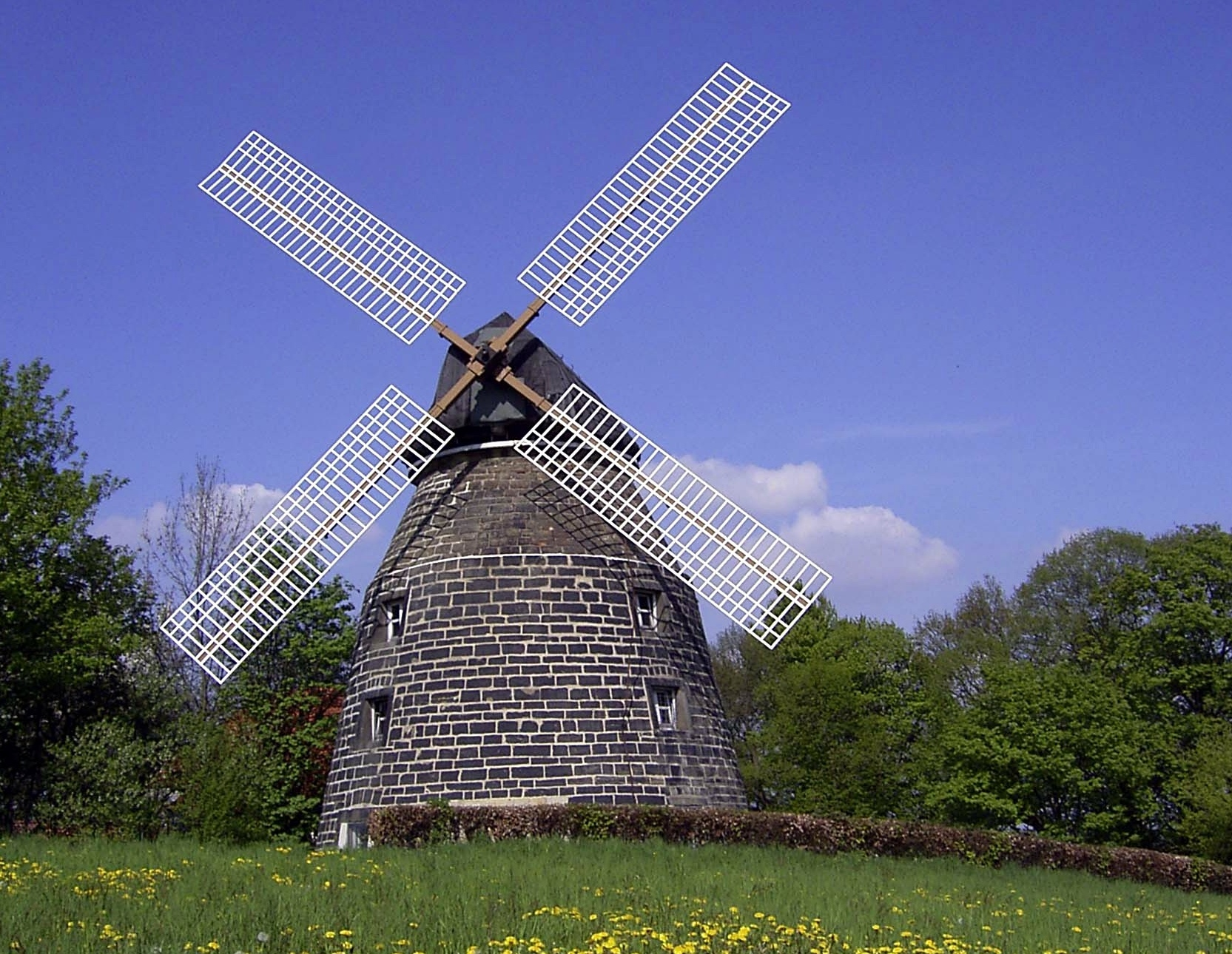 Windmühle auf dem Rodenberg – Das Wahrzeichen der Stadt Rodenberg im Landkreis Schaumburg, Niedersachsen.